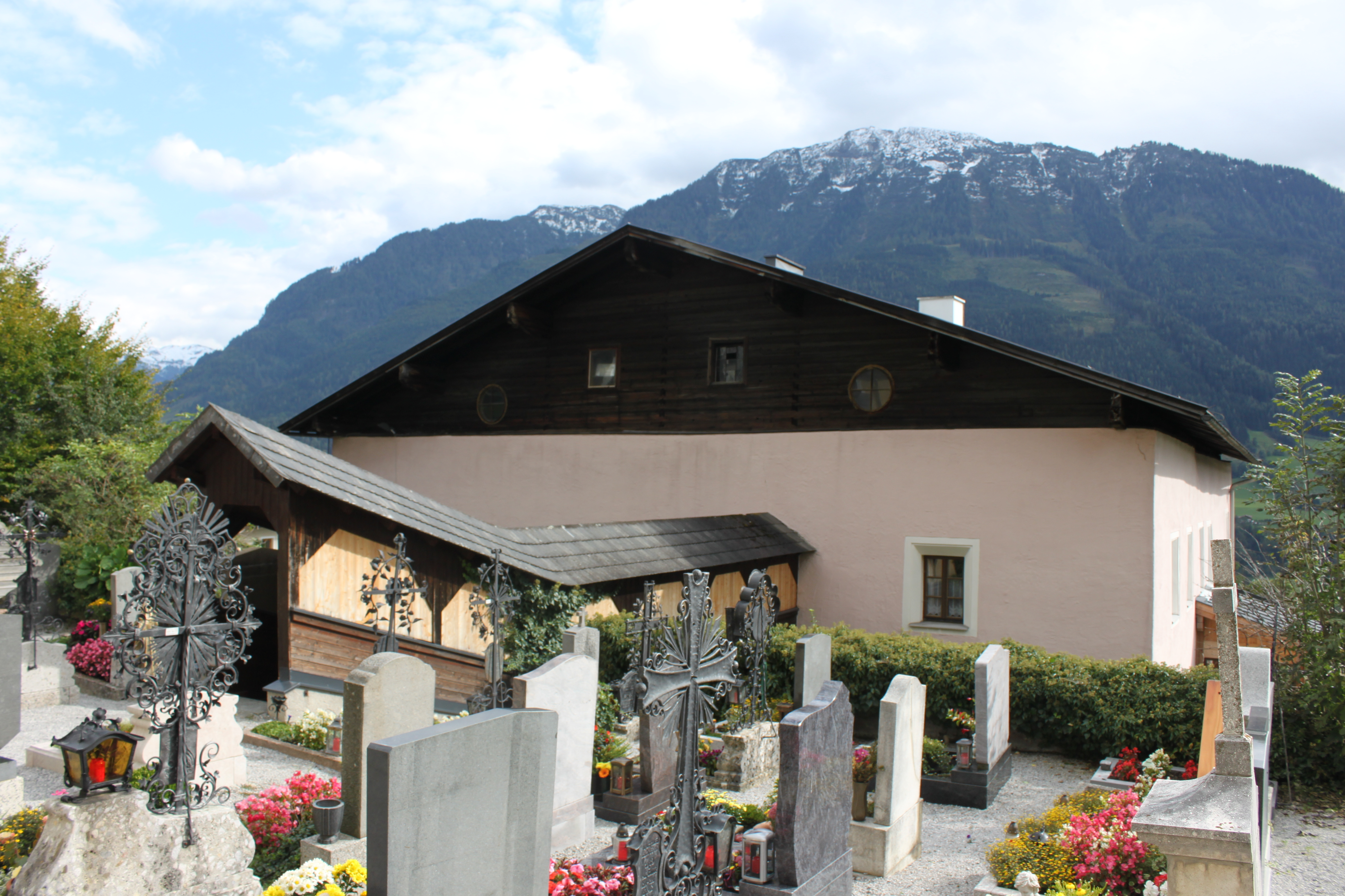 Pfarrhof